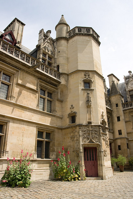 Hôtel de Cluny